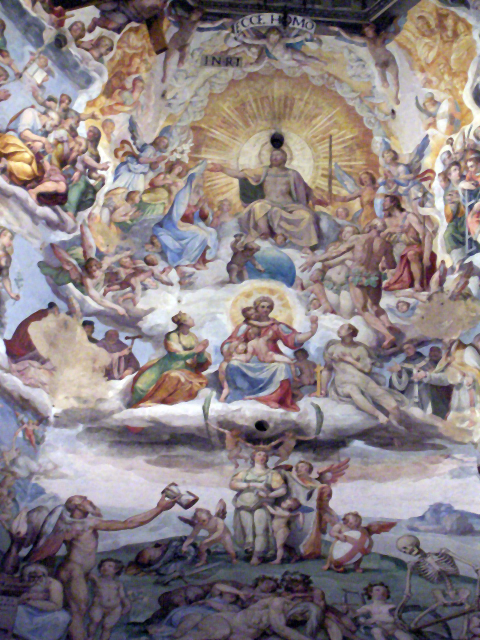 detail